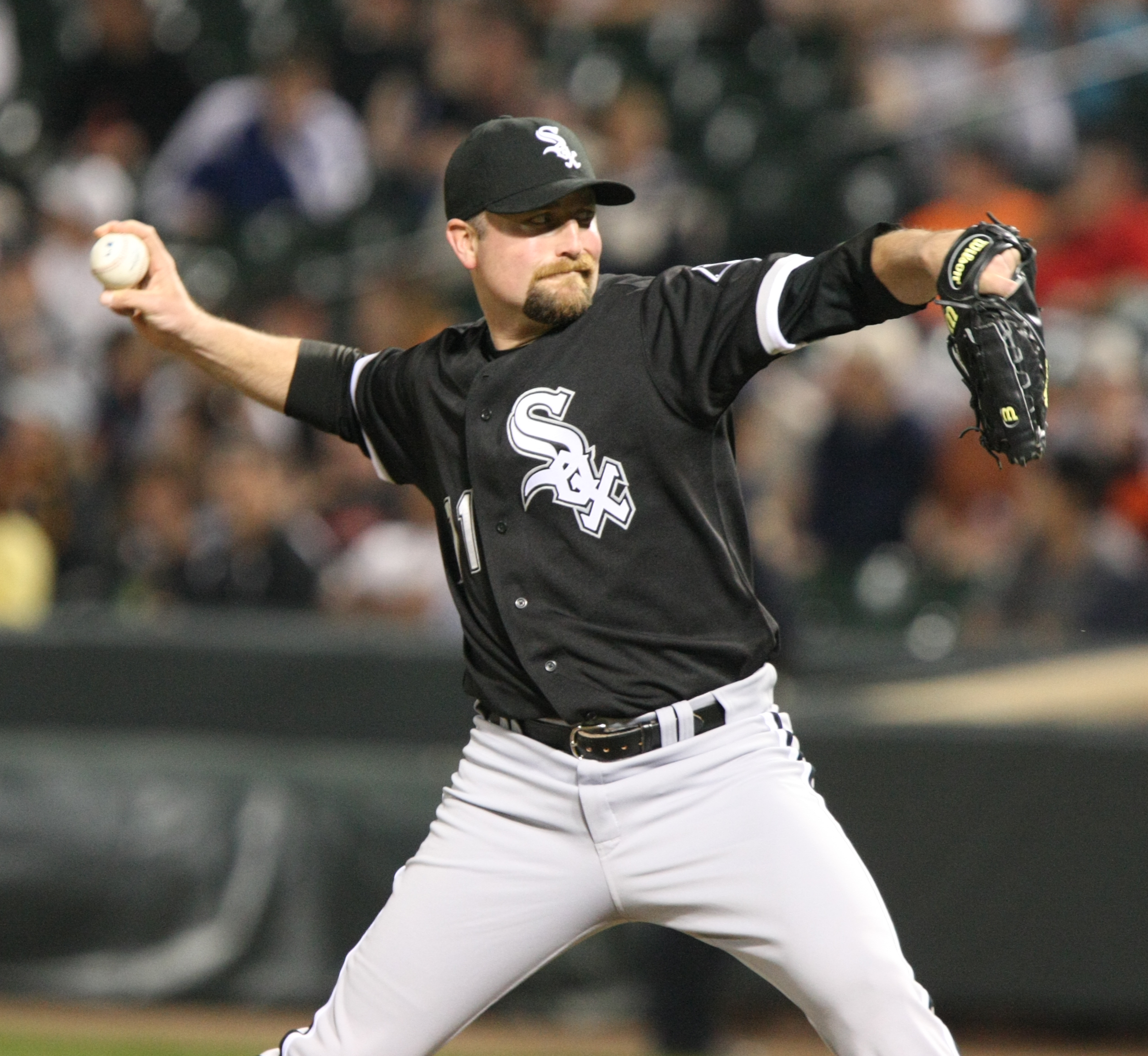 Scott Linebrink